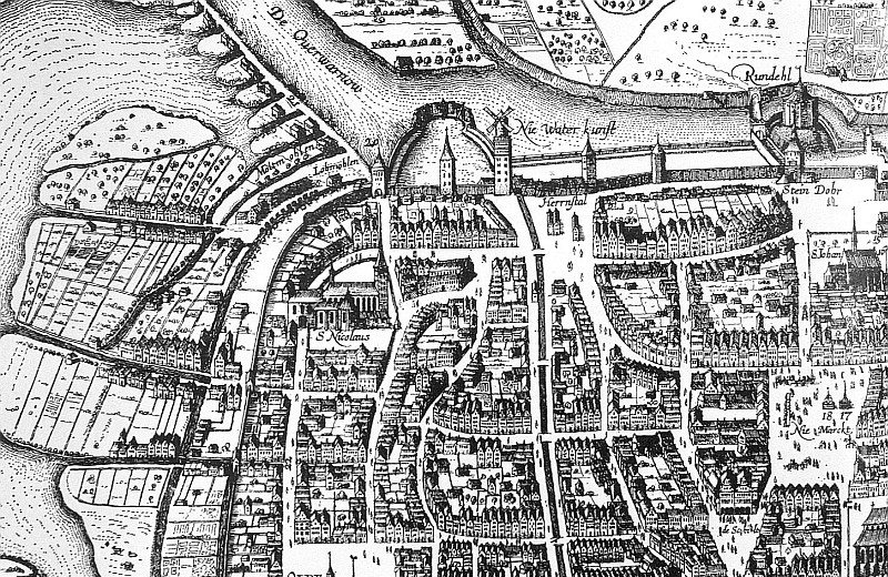 Original image description from the Deutsche Fotothek Rostock. Stadtansicht mit Wasserkunst, 1657, Ausschnitt